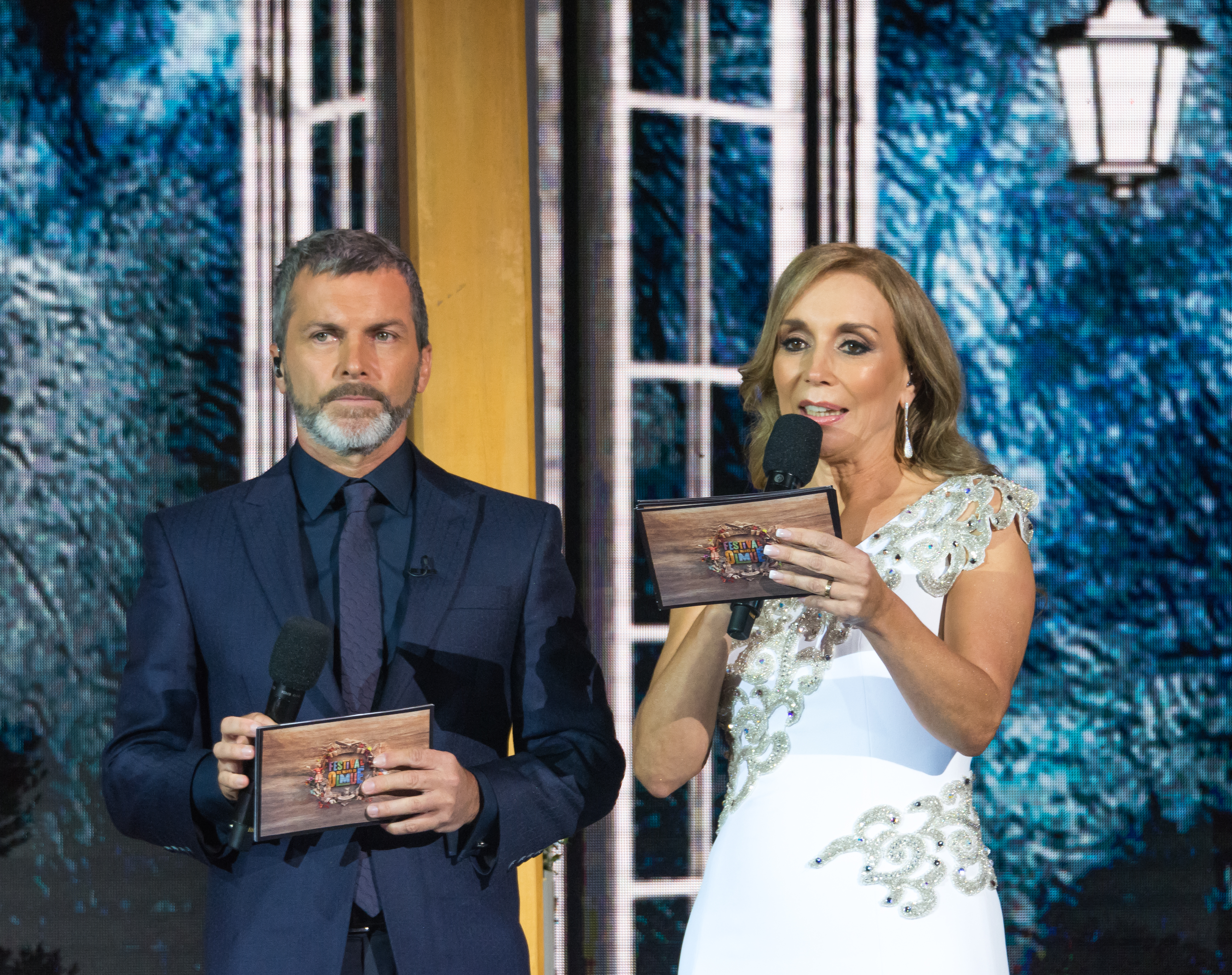 Cristián Sánchez, Karen Doggenweiler, Festival del Huaso de Olmué, Parque El Patagual, Olmué, Región de Valparaíso, Chile.